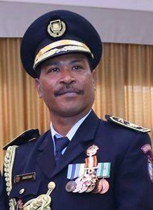 2º. Comandante Geral da PNTL, Comissário Faustino da Costa